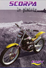 Moto trial Scorpa Easy